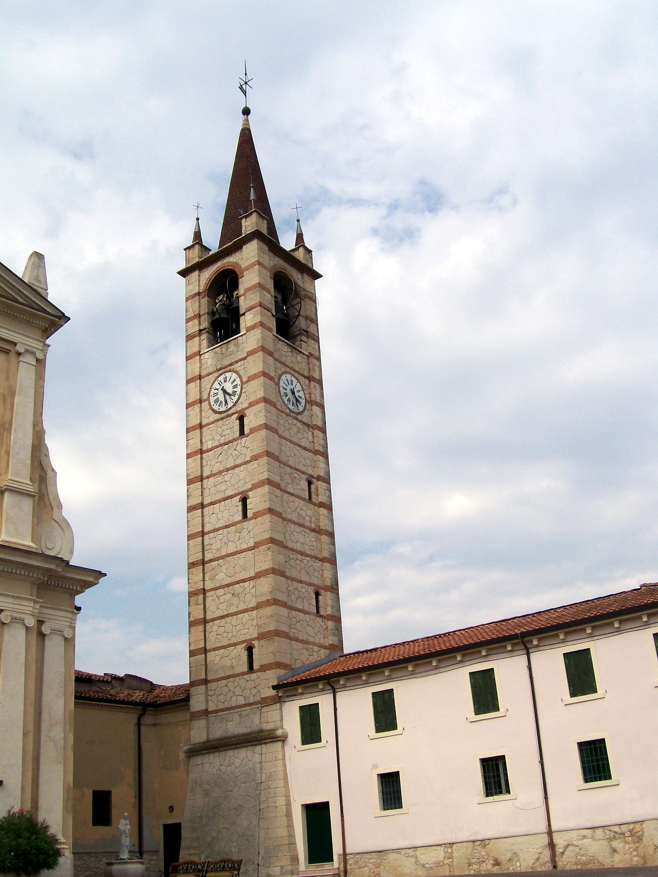 Campanile della chiesa parrocchiale dei Santi Vittore e Corona in San Vittore di Colognola (VR).